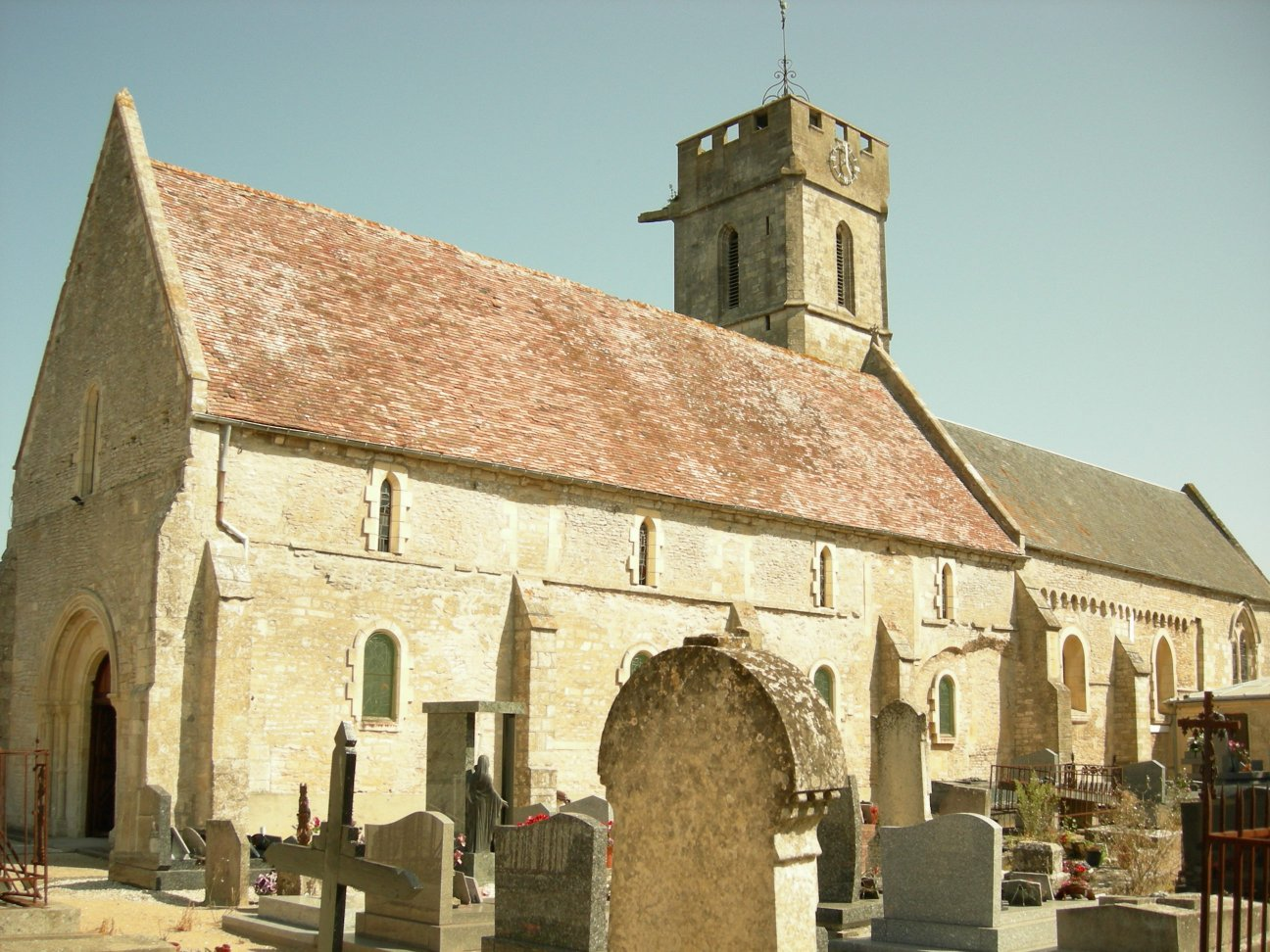 Église de Colleville-Montgomery, dont le chœur est inscrit à l'inventaire supplémentaire des monuments historiques (ISMH, 16/05/1927)